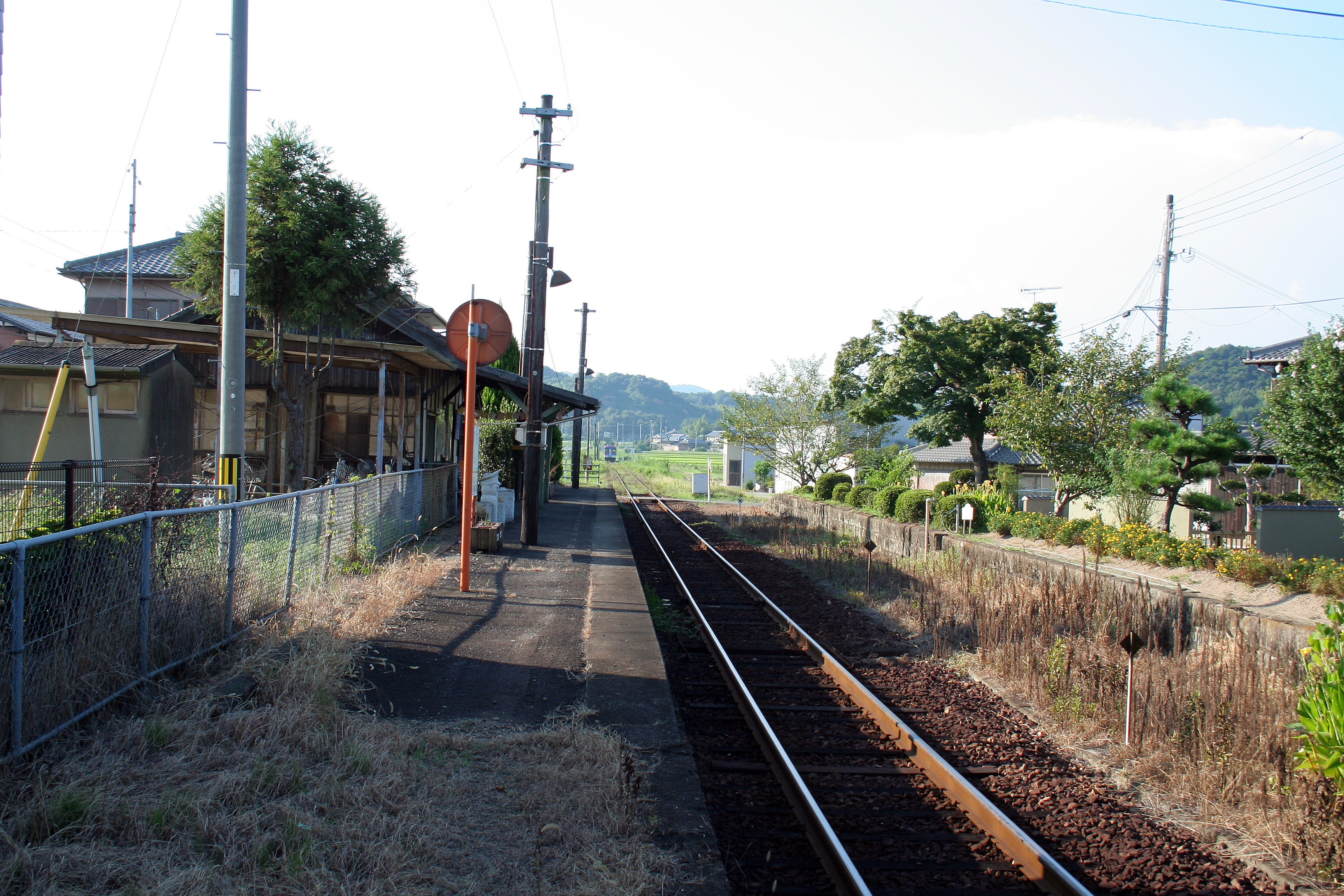 長駅。日本にある鉄道駅の一つ。 ホームから北西方向を撮影。